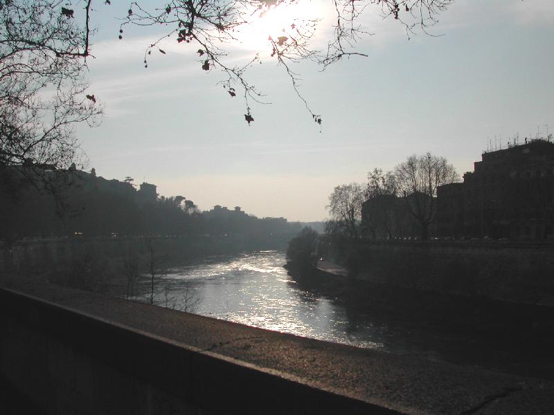 Roma il Tevere dal Ponte inglese (a sinistra, l'Aventino) by Lalupa